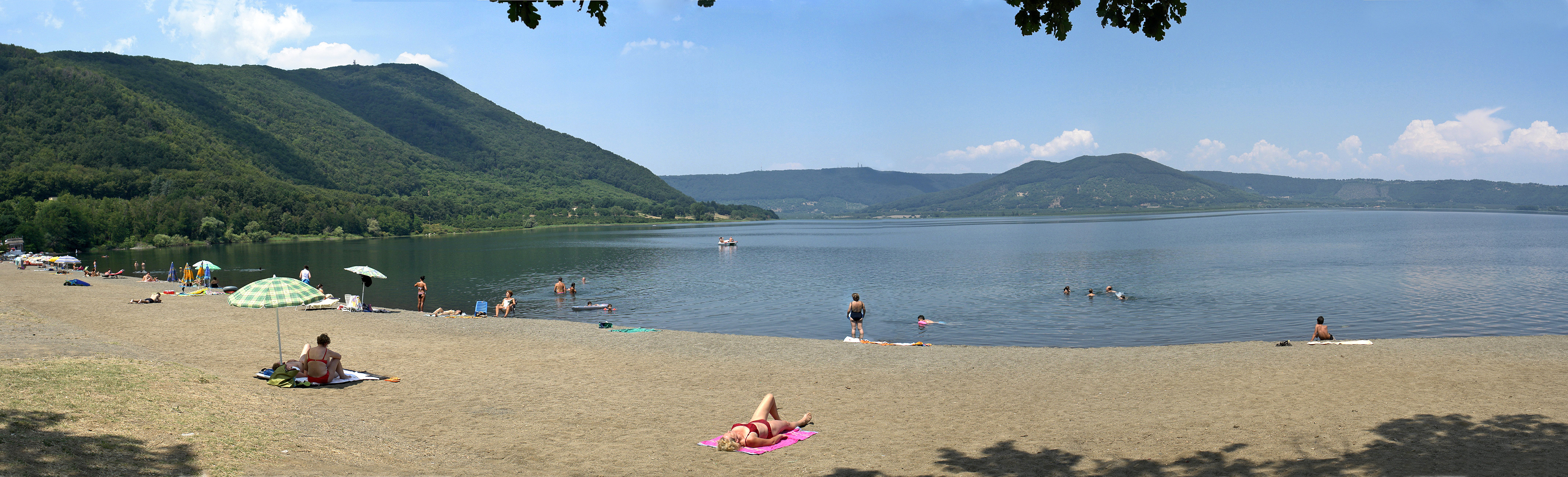 Lago di Vigo, Südstrand